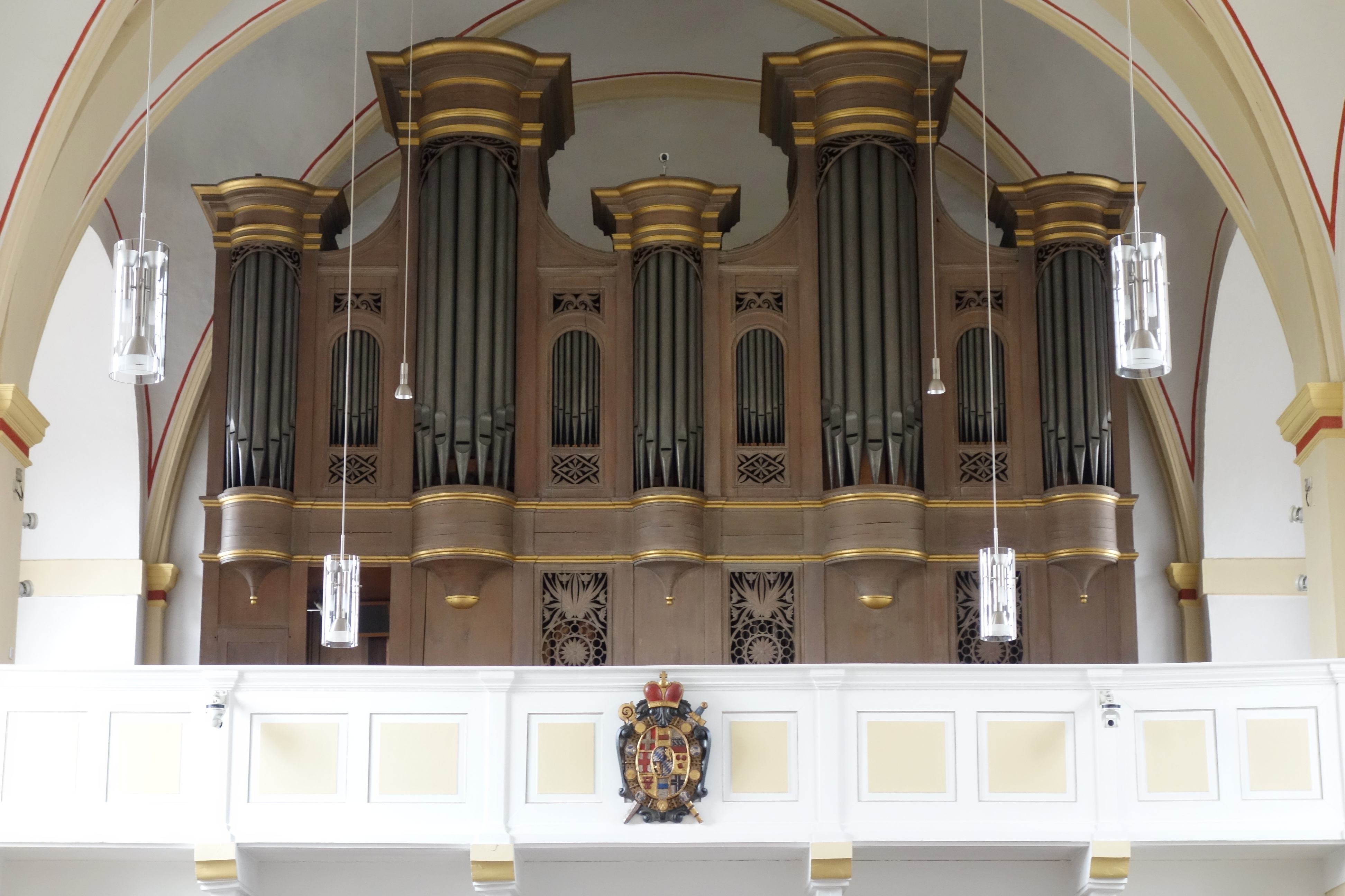 St. Johannes Nepomuk Burgsteinfurt, Kreis Steinfurt, Nordrhein-Westfalen, Deutschland